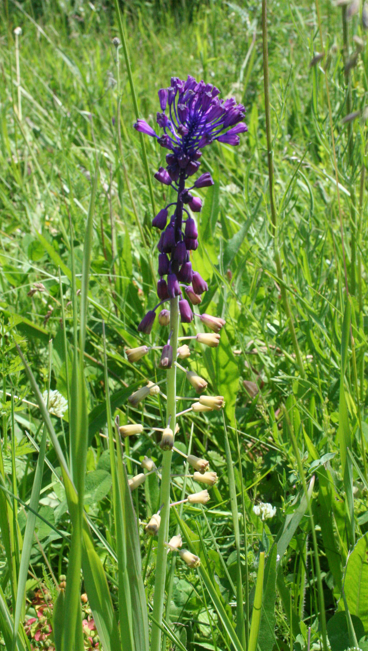 Photo by Seweryn Olkowicz